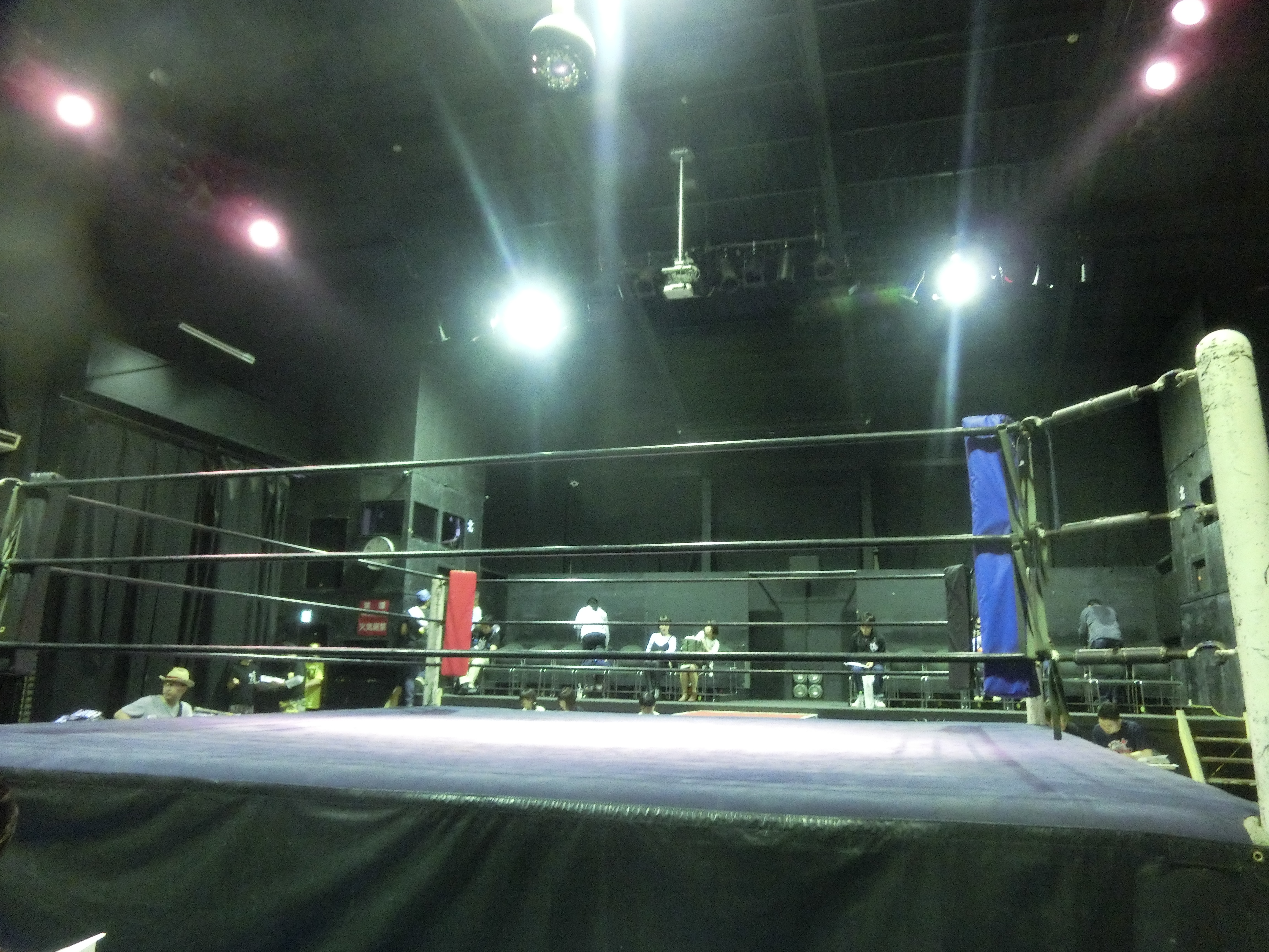 新木場風景2016